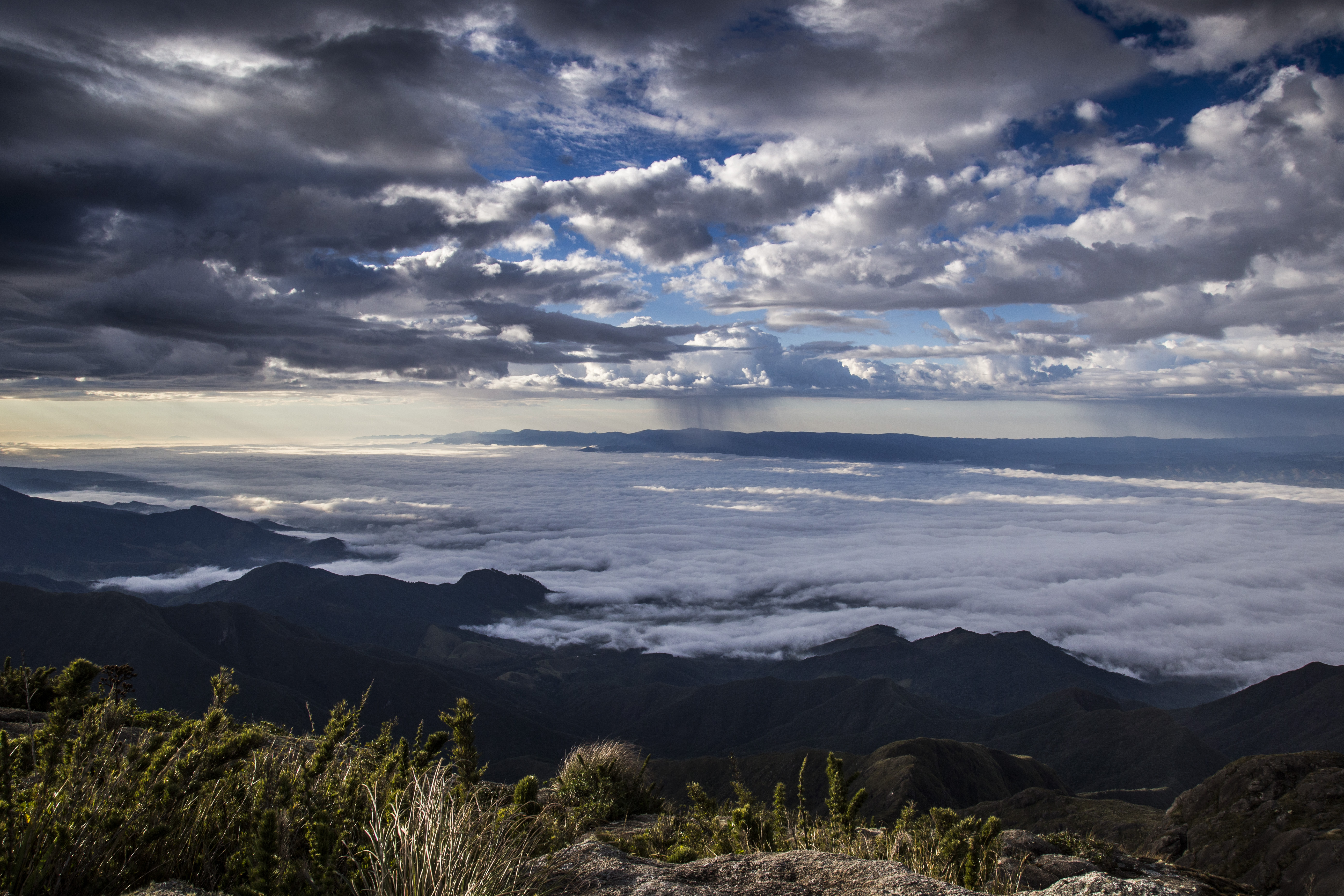 Foto tirada no pico dos marins